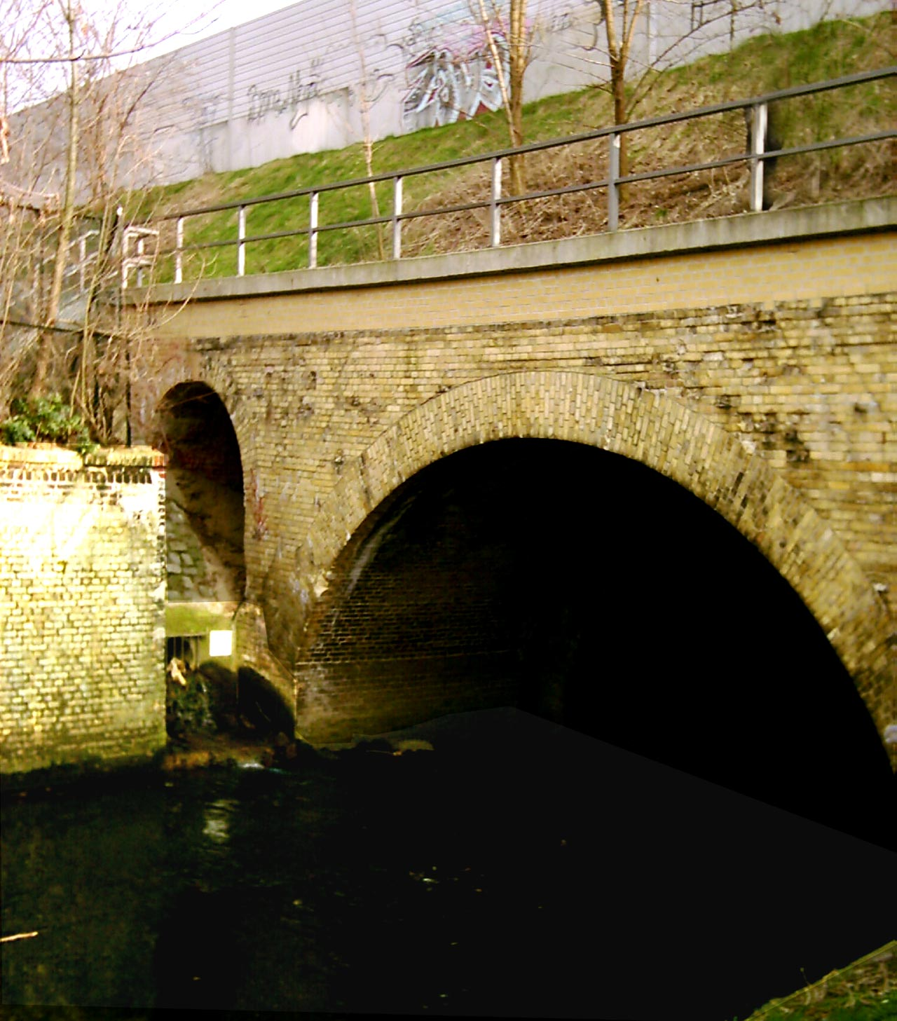 Berlin-Gesundbrunnen. Die alte Eisenbahnbrücke über die Panke mit der neuen Streckenführung.